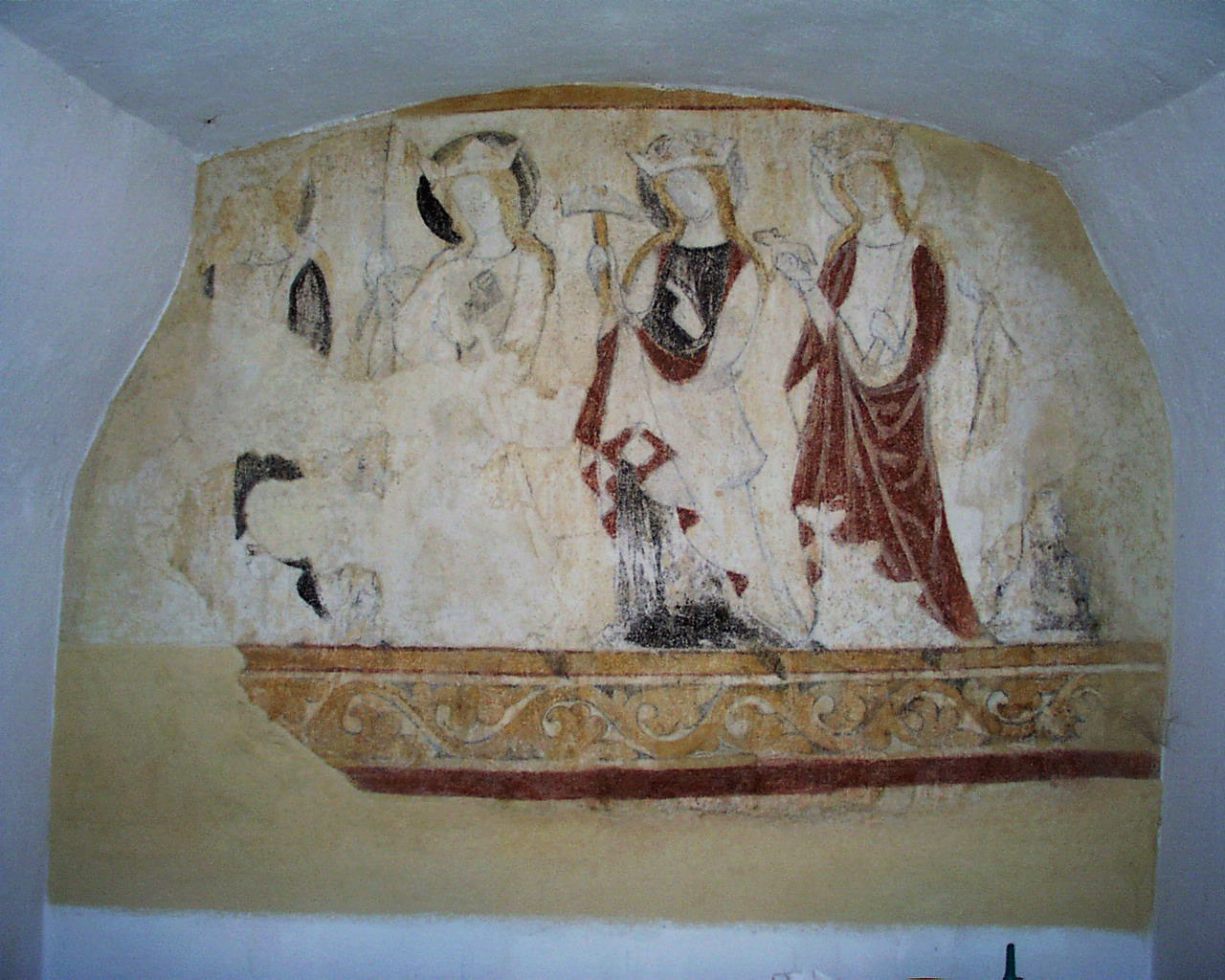 Fresko in der Sakristei der historischen Dorfkapelle Weitersborn